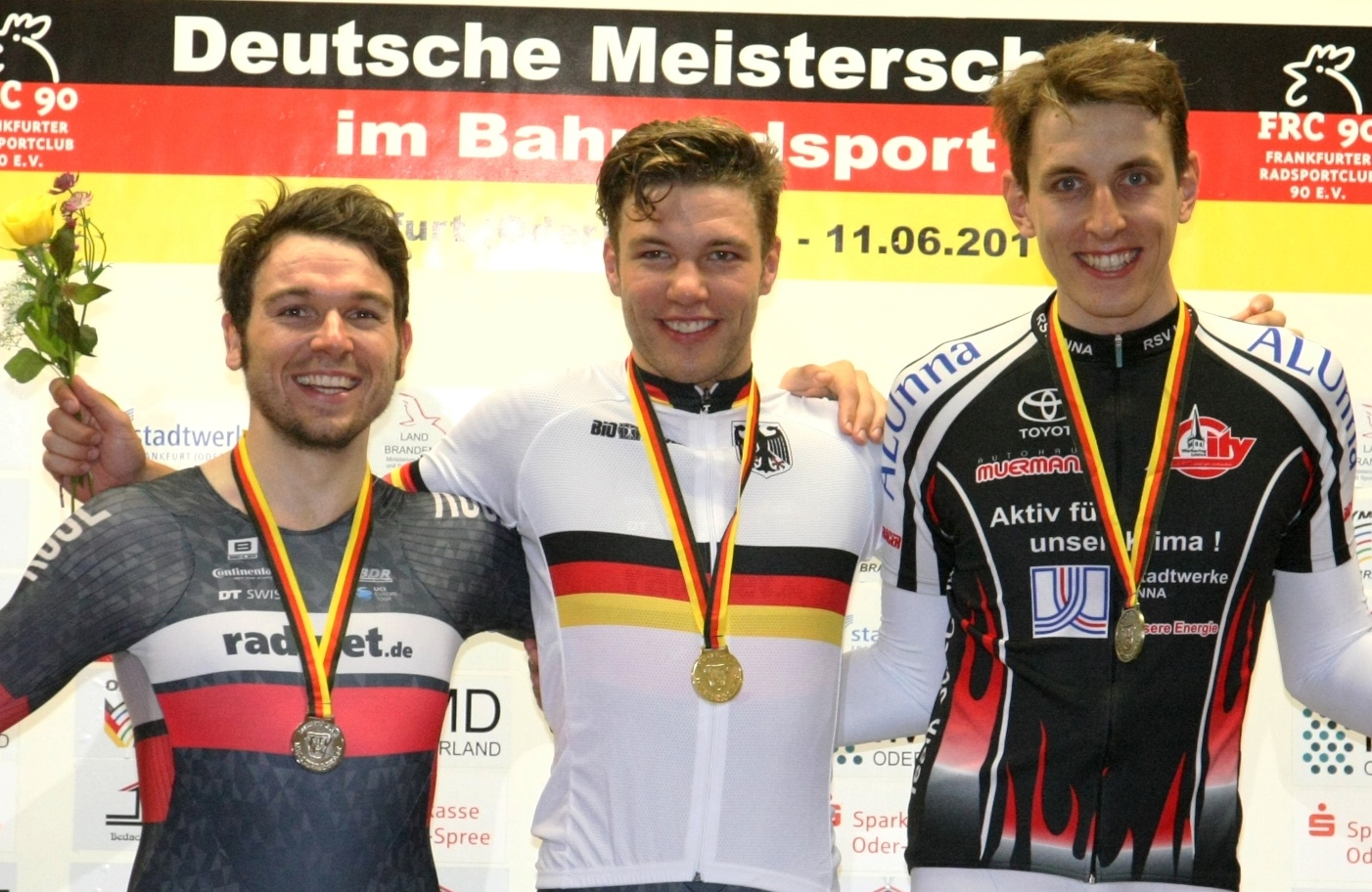 Podium Einerverfolgung der Männer (v.l.n.r.): Kersten Thiele, Domenic Weinstein, Justin Wolf